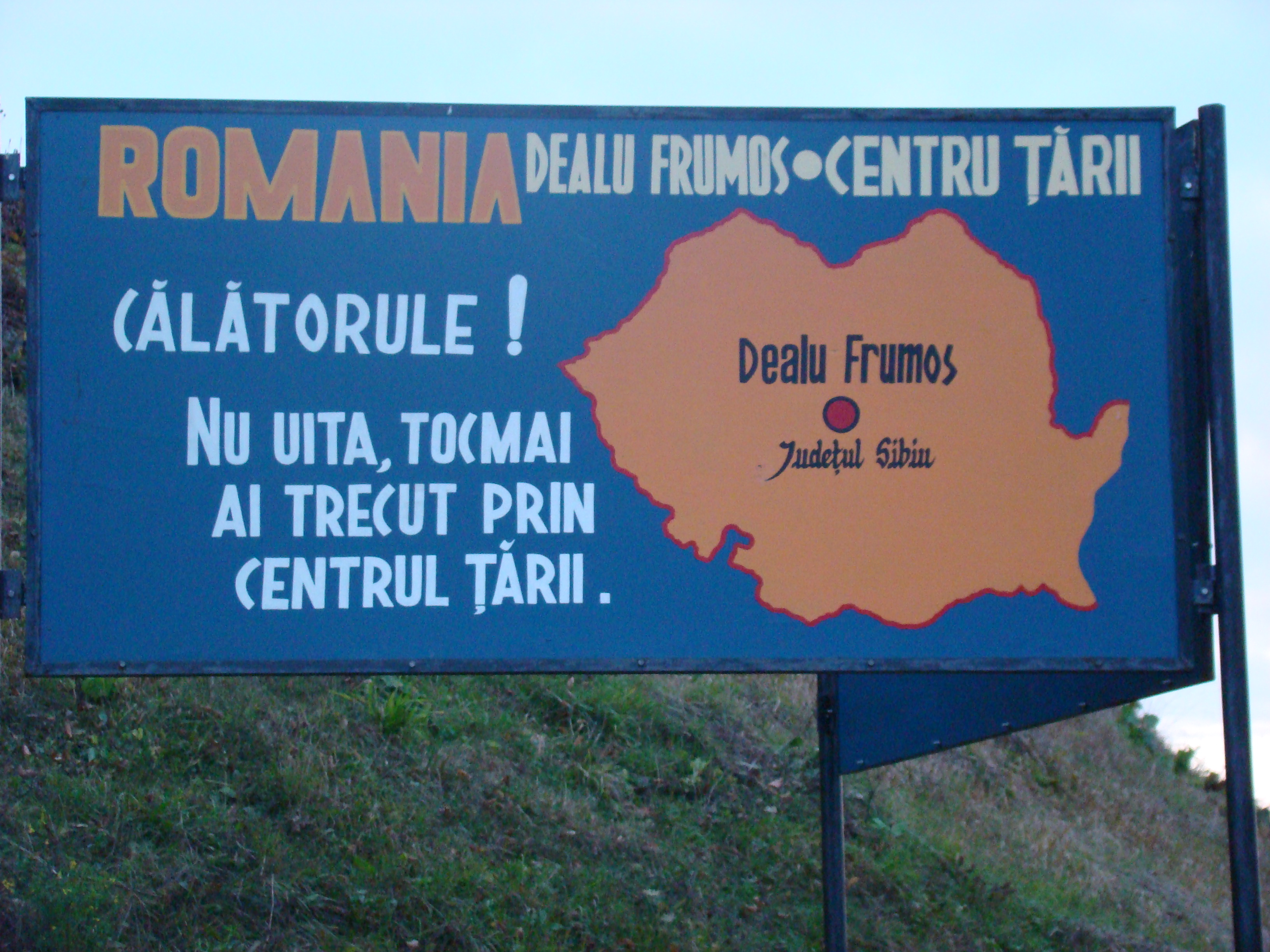 central point of Romania, near Dealu Frumos, Sibiu County